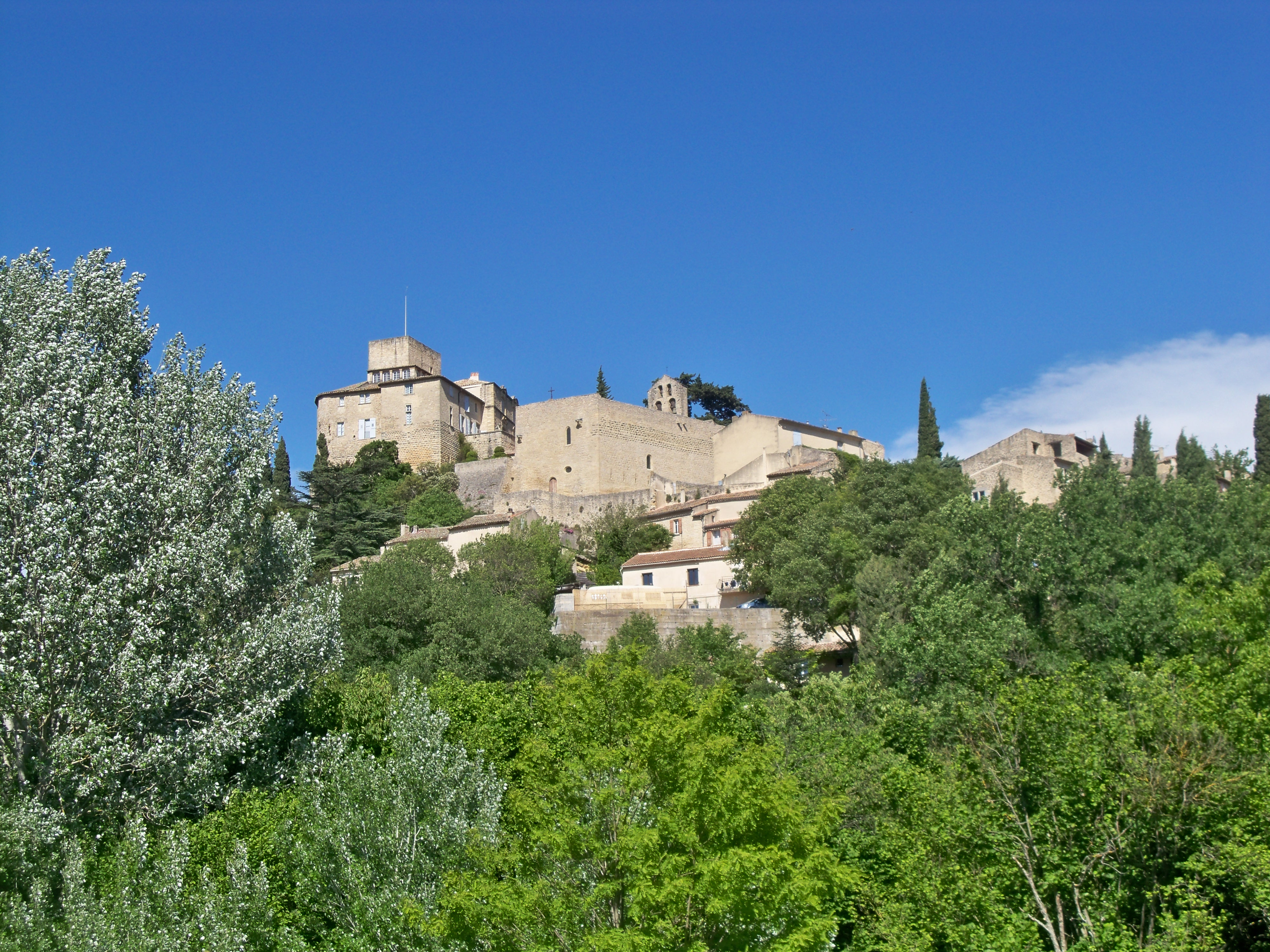 vue sur le village d'Ansouis (84)